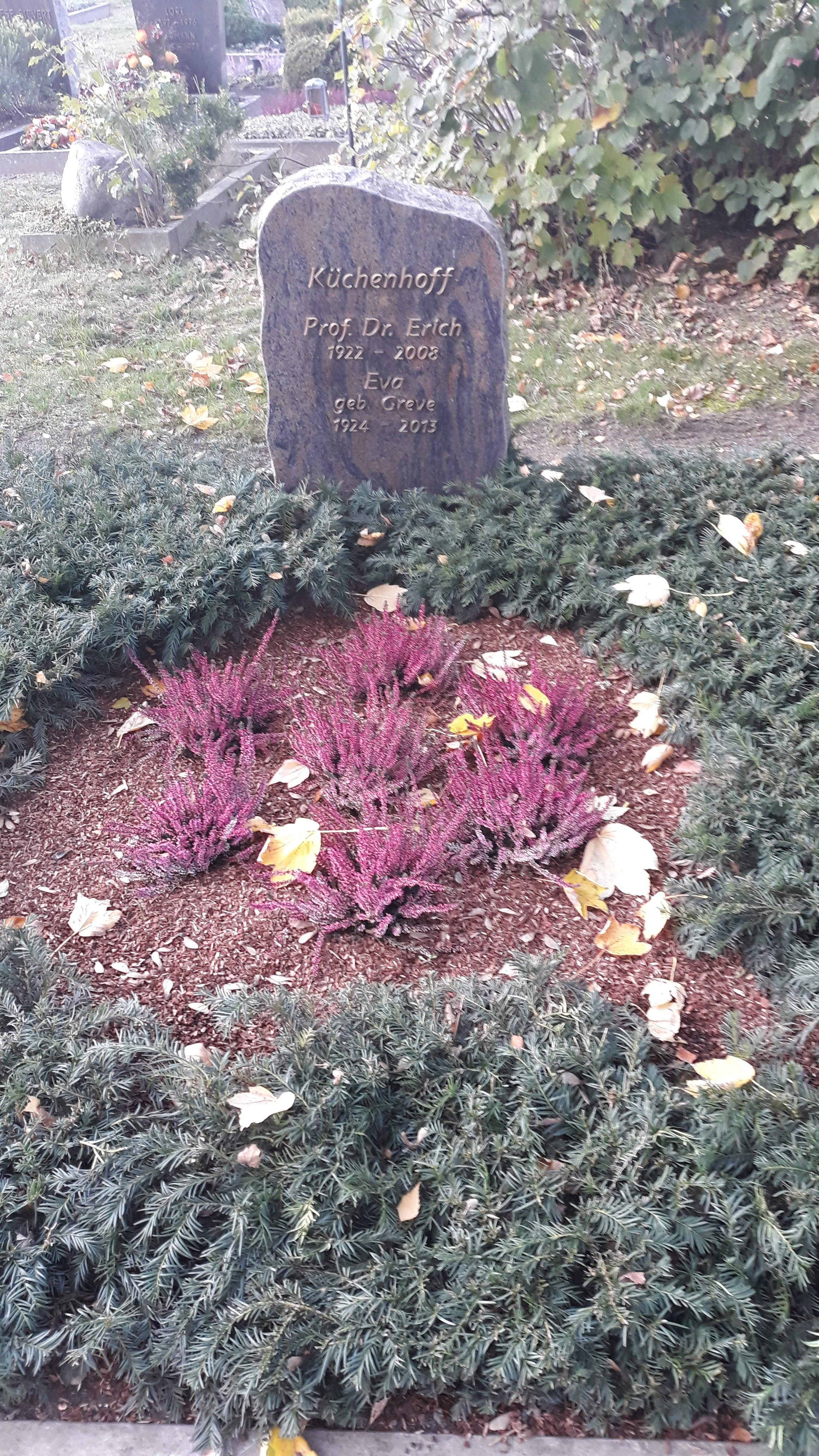 Das Grab des deutschen Juristen Erich Küchenhoff und seiner Ehefrau Eva auf dem Zentralfriedhof Münster.